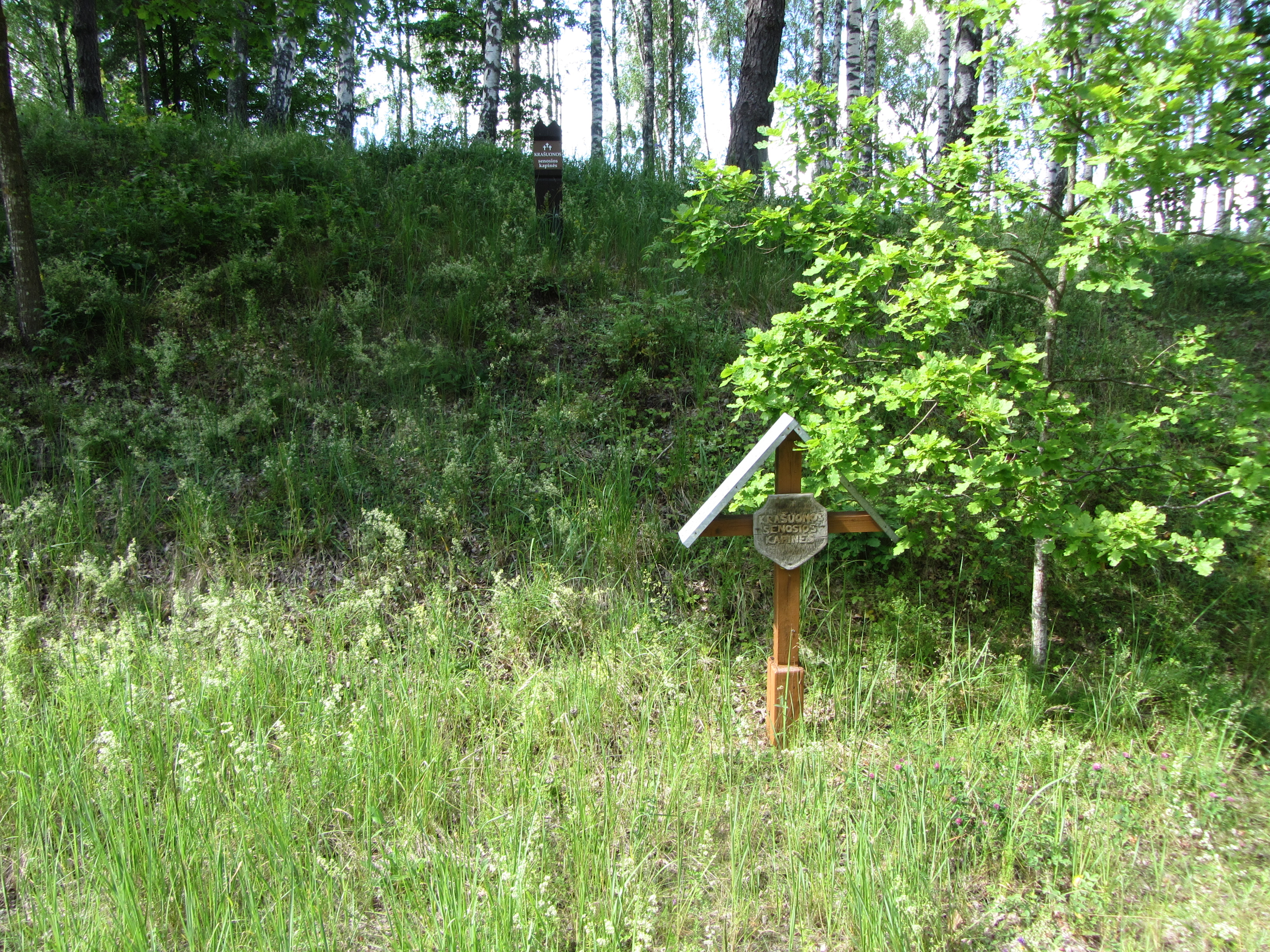 Švenčionių sen., Lithuania